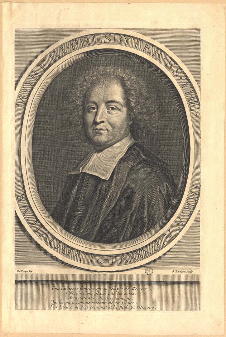 Portrait of Louis Moréri (1643-1680), frontispiece 32x21,5cm. Caption reads: LUDOVICUS MORERI - PRESBYTER - SS - THE - DOC - A° AET - XXXVII (L. Moreri, priest of the Holiest church, deceased at the age of 37). Poem (in French): Tous ces Héros fameux qu'au Temple de Mémoire, Nous voions placés par tes soins, Sont autant d'illustres tesmoins, Qui feront à jamais retentir de ta Gloire, Les Lieux ou l'on connoist et la fable et l'Histoire.